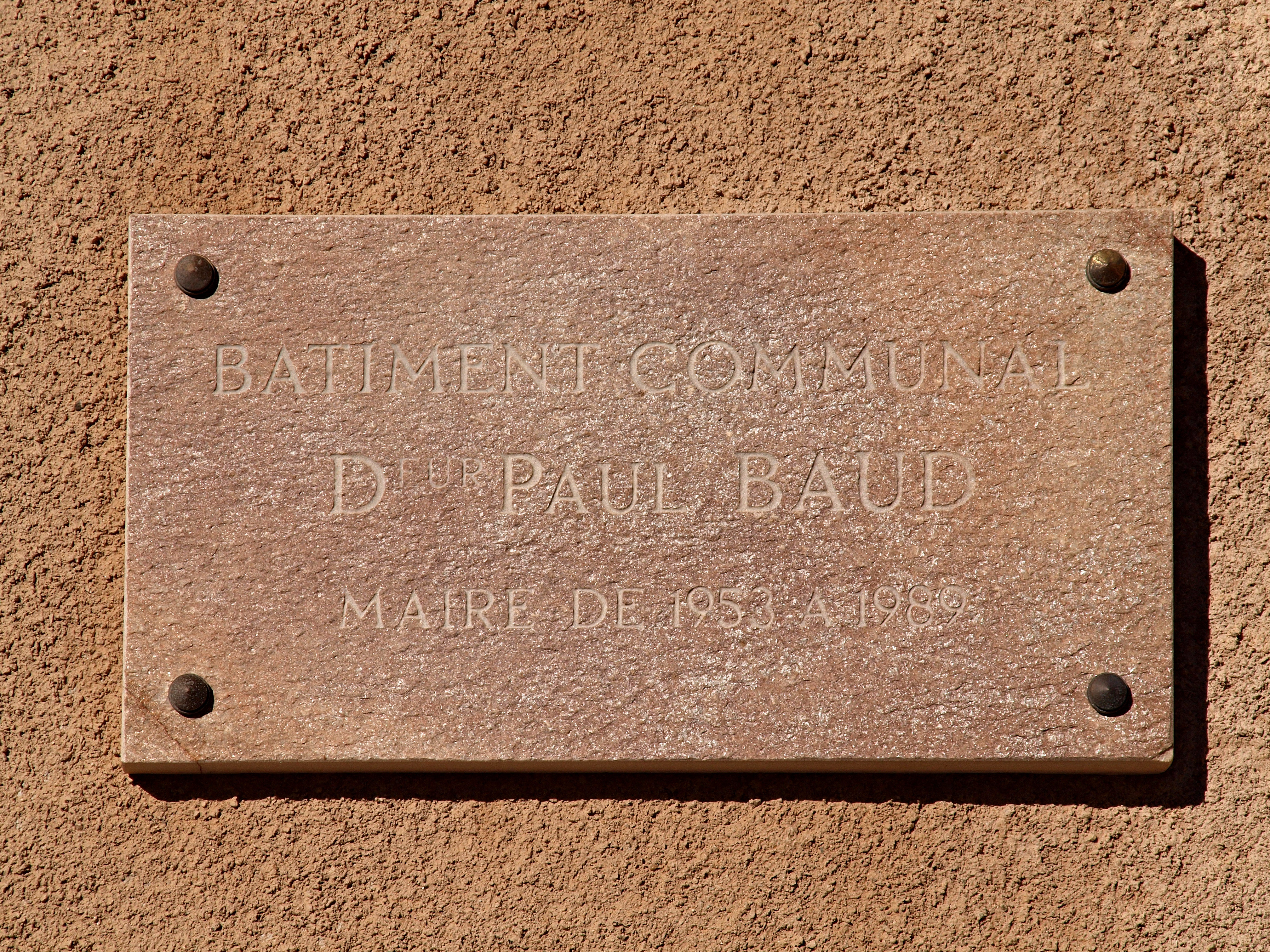 Antisanti (Corsica) - Plaque sur bâtiment communal "Dr Paul Baud maire de 1953 à 1989"